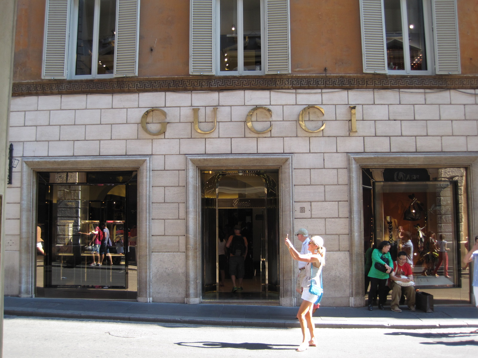 Boutique Gucci de Rome